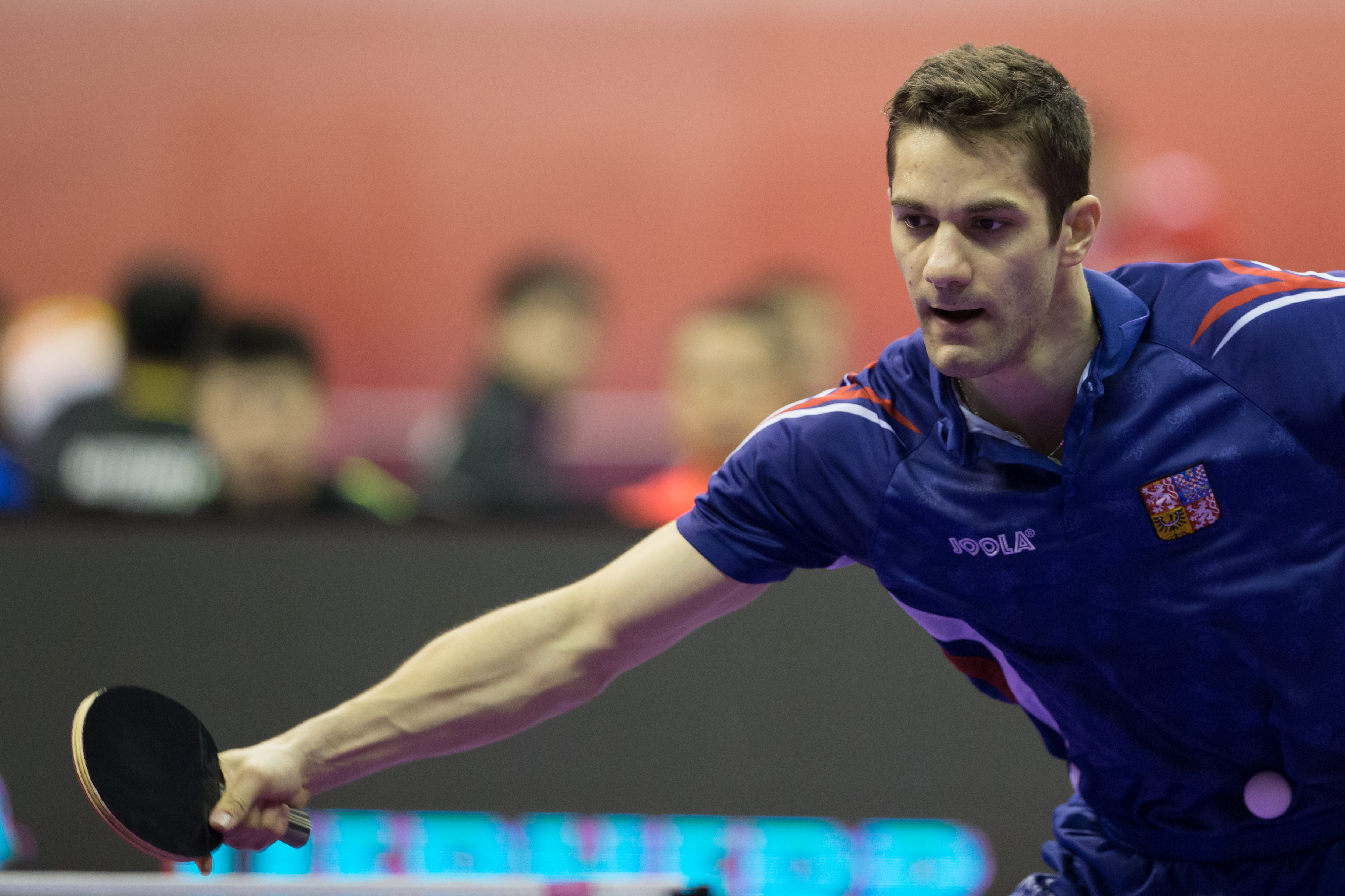 _K0K8968